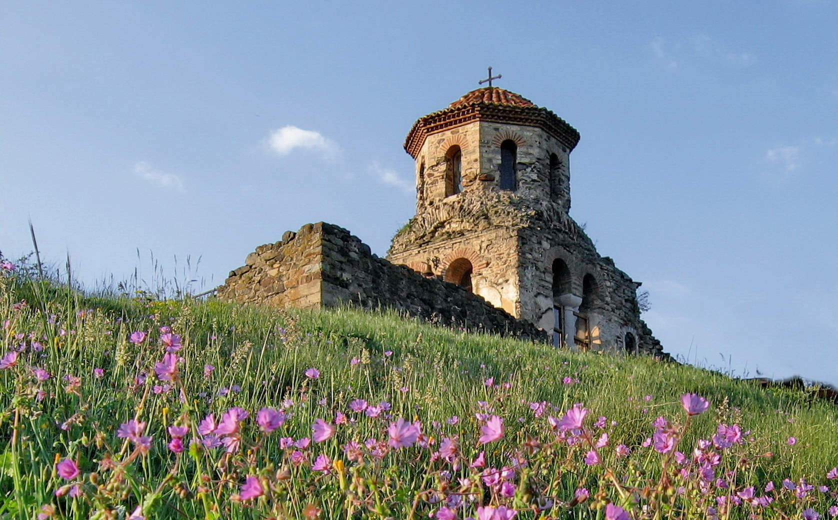 Srednjevekovni srpki manastir